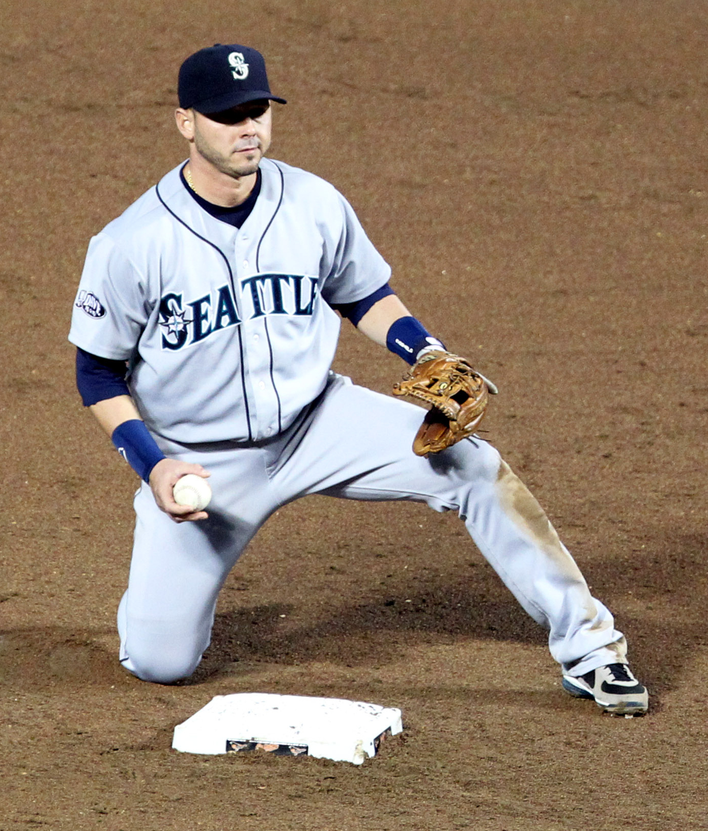 Luis Rodríguez